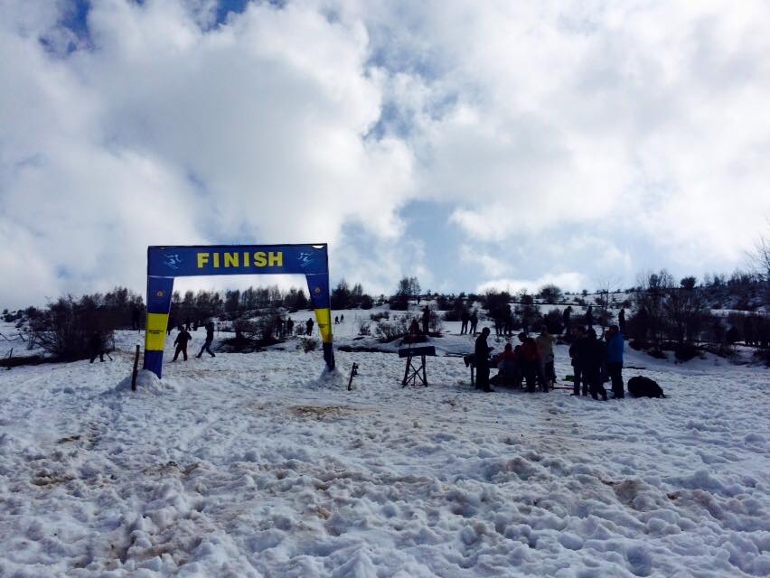 Pista skive ne kampionat mes Qytetit te Korces Fshatit Borje Novosej dhe fshatit Shishtavec